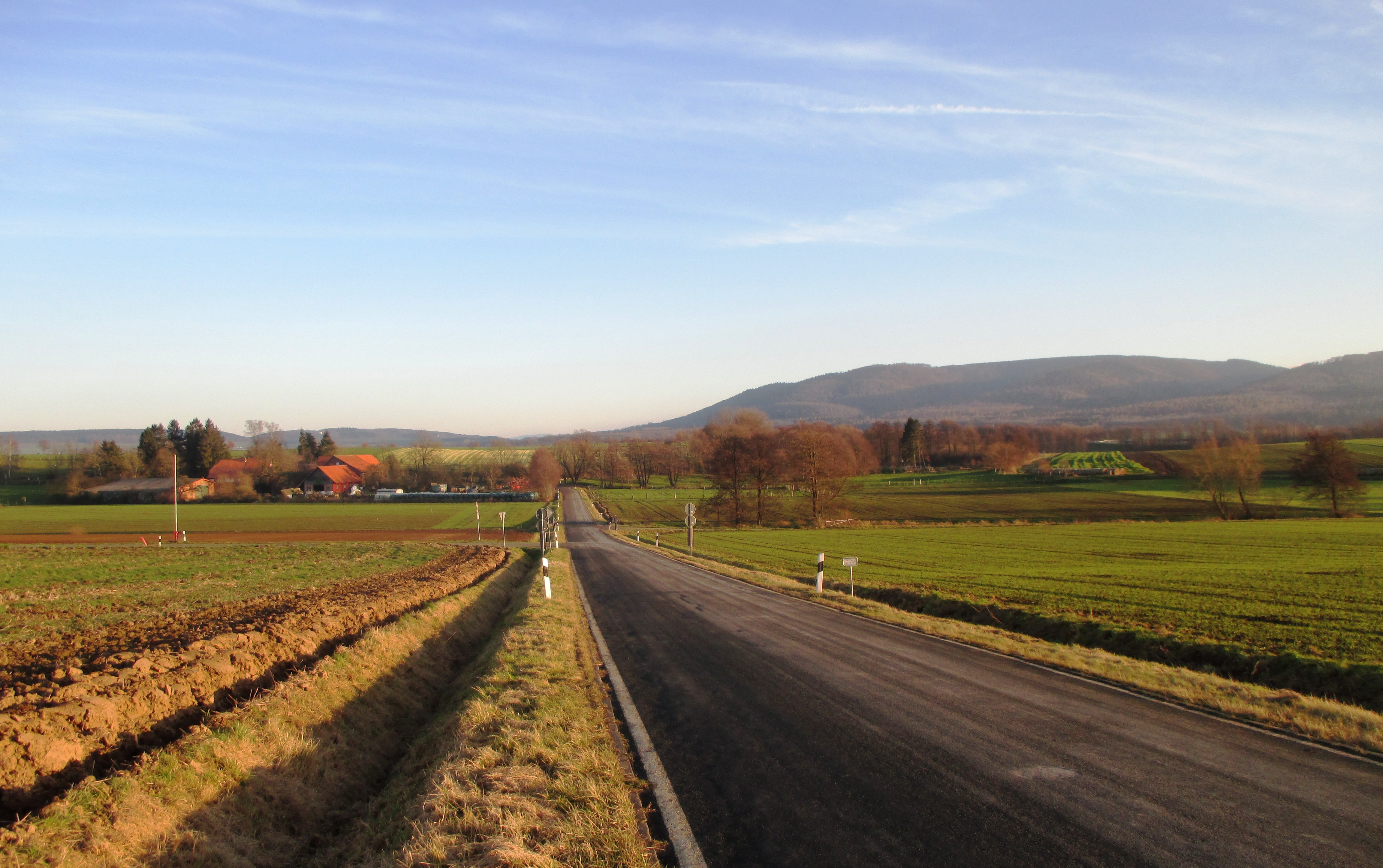 Pöbbeckenmühle mit Landesstraße 594, Lutter am Barenberge, Landkreis Goslar